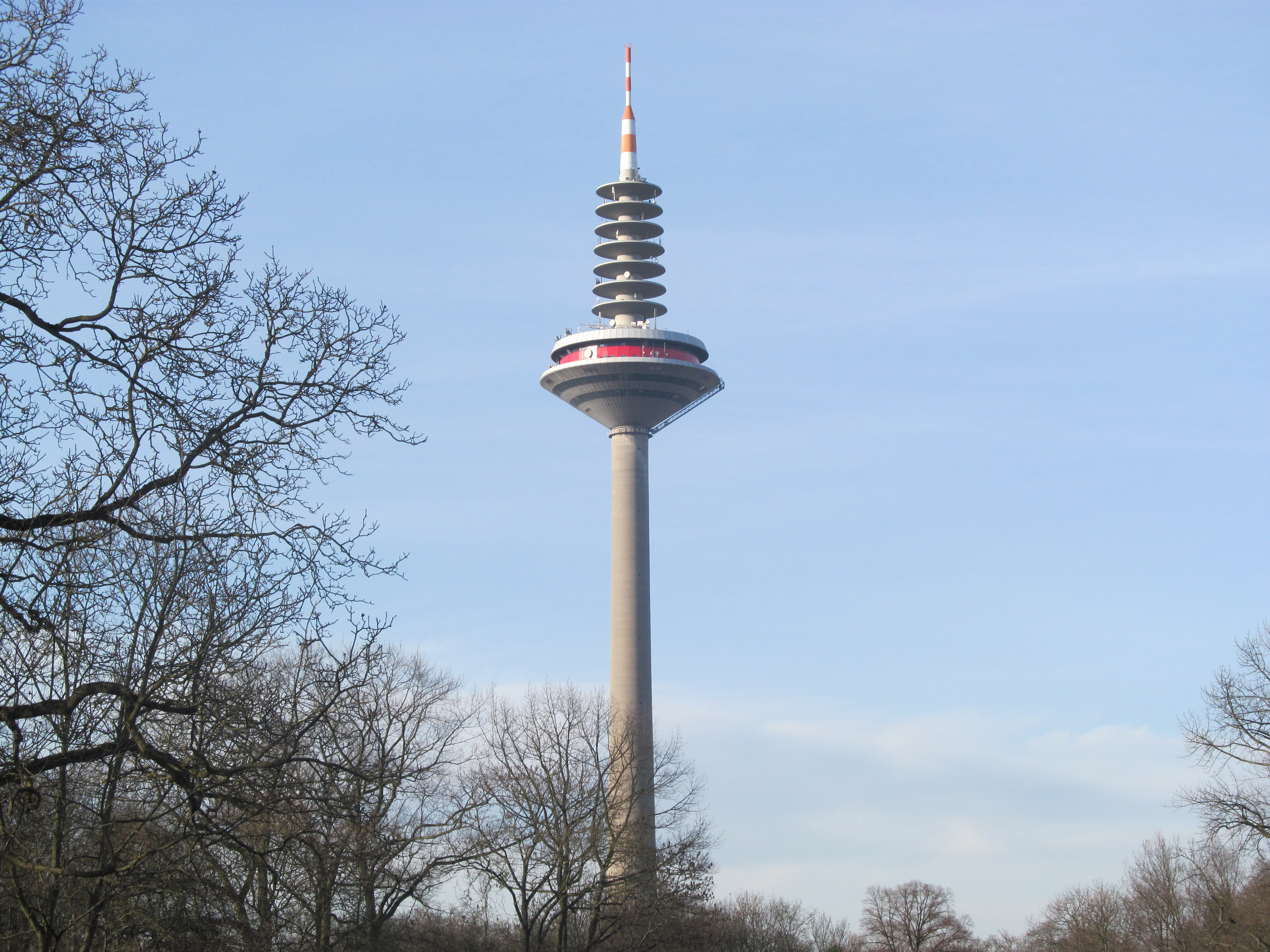 Europaturm am Nachmittag vom Grüneburgpark aus gesehen